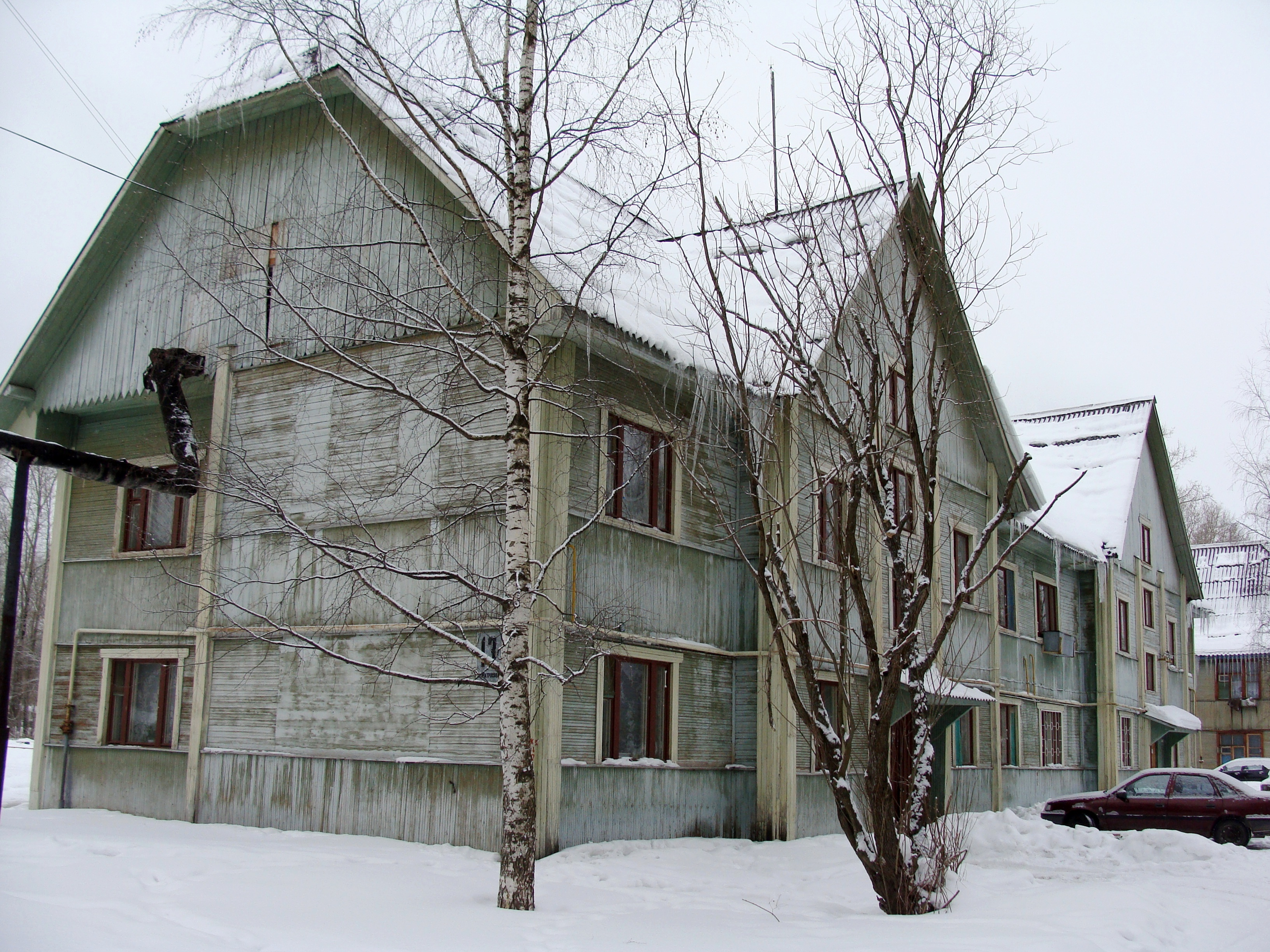 Коряжма, ул. Матросова, д.13. Типовой проект 241-115. Введен в эксплуатацию в 1937 г.